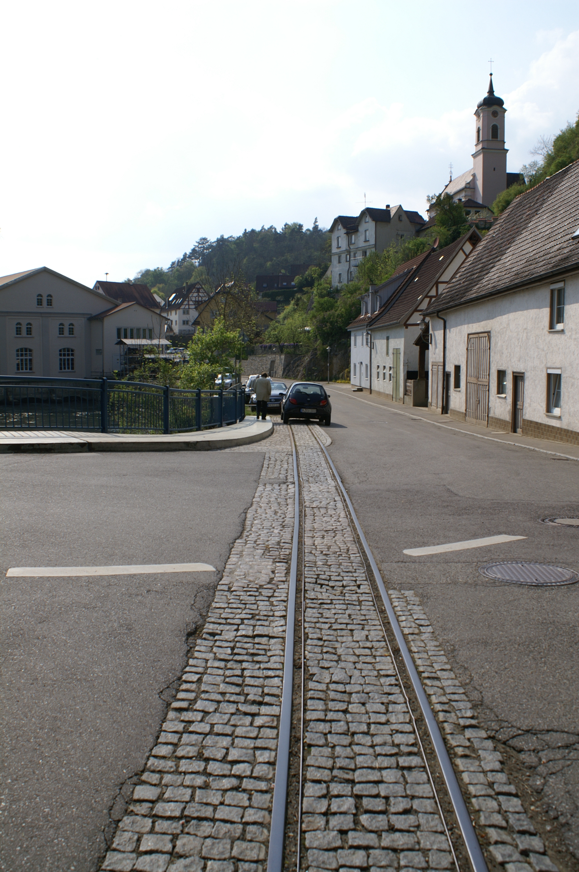 Gleisanlage der Feldbahn Rechtenstein